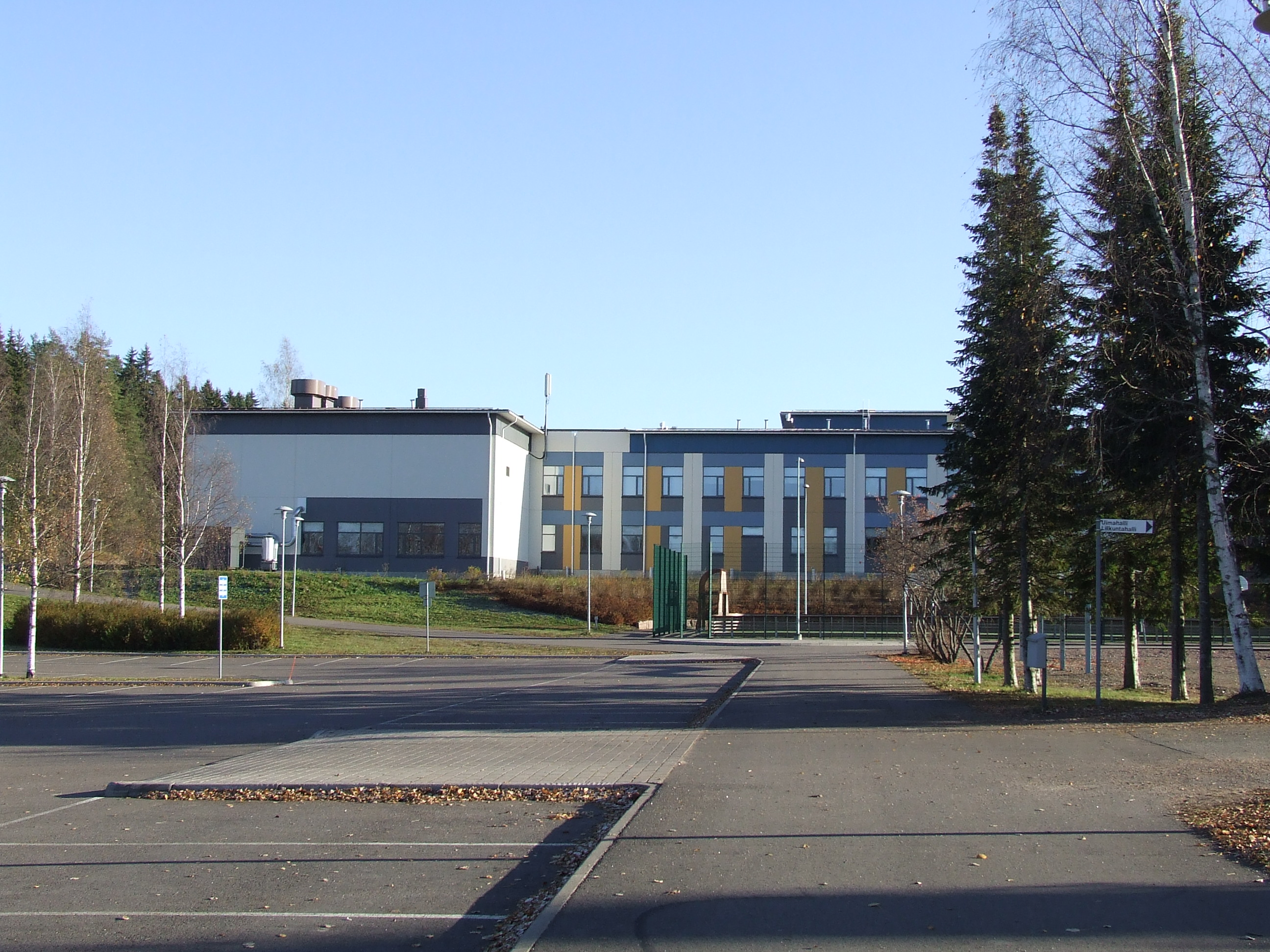 Vehkalahden koulu Haminassa.